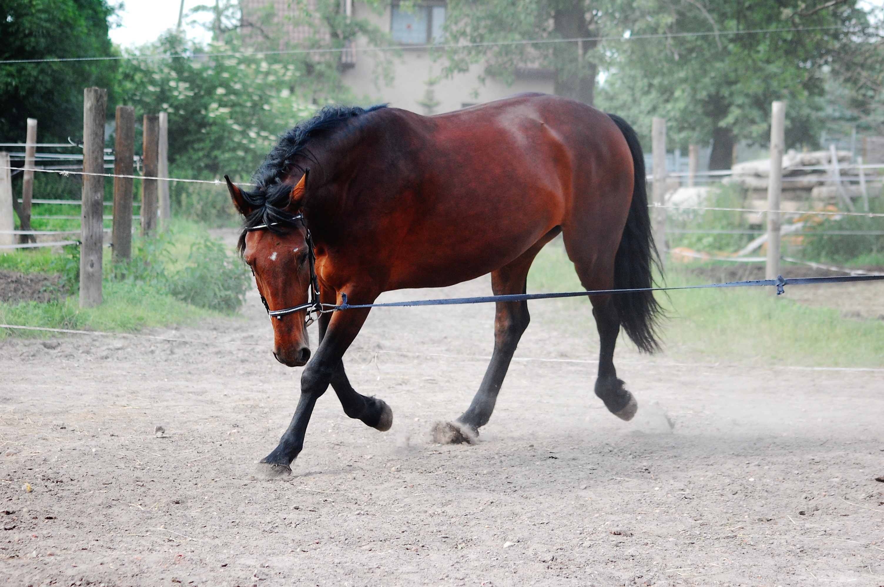 Bay mare of Silesian horse